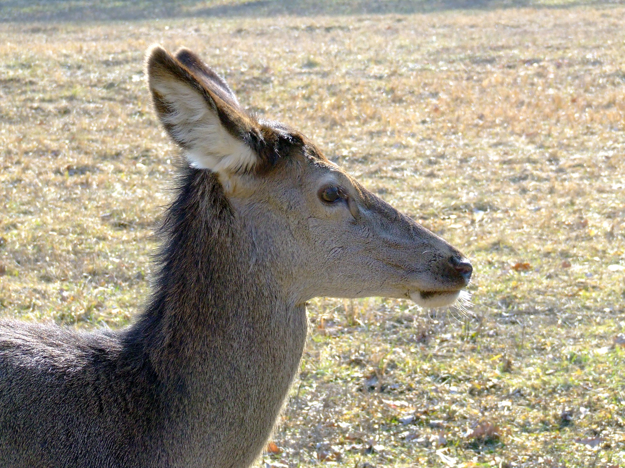 Duna-Dráva Nemzeti Park, Gemenci erdő